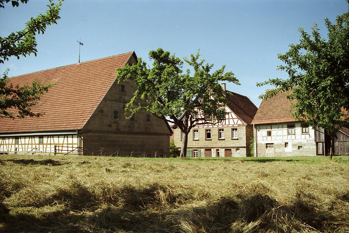 Hohenloher Freilandmuseum. Links Stall-Scheune aus Bühlerzimmern, in der Mitte Wohn-Stall-Haus aus Schönenberg mit dem Museumsladen, rechts Hinterhaus aus Oberrot